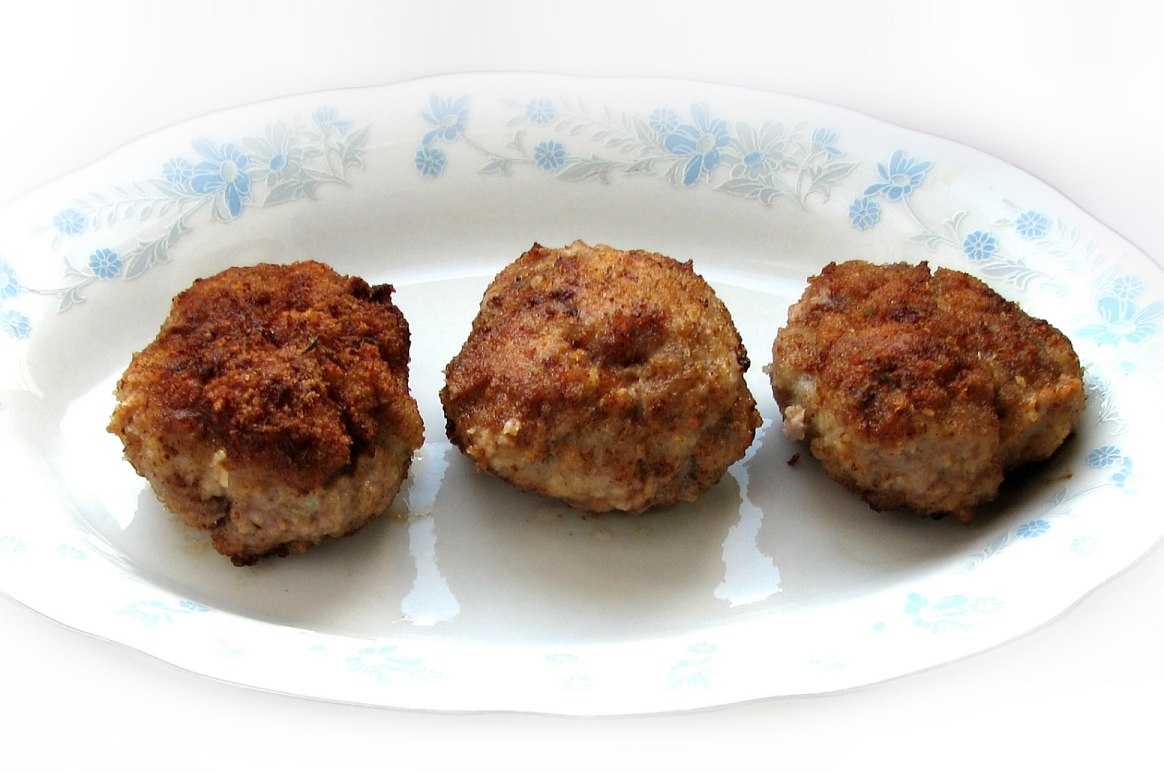 mielone 4